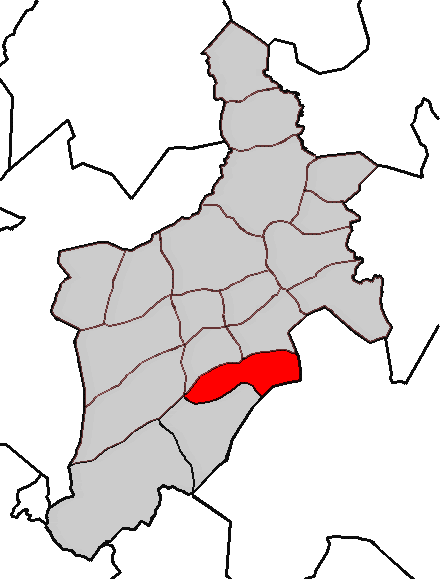 Situación da parroquia de Leiro no concello de Abegondo